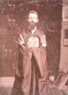 Arnošt Hofbauer ve svém atelieru